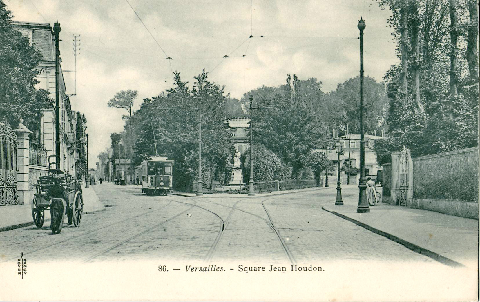 Carte postale éditée par Rover à Nancey, n°86 : VERSAILLES - Square Jean Houdin